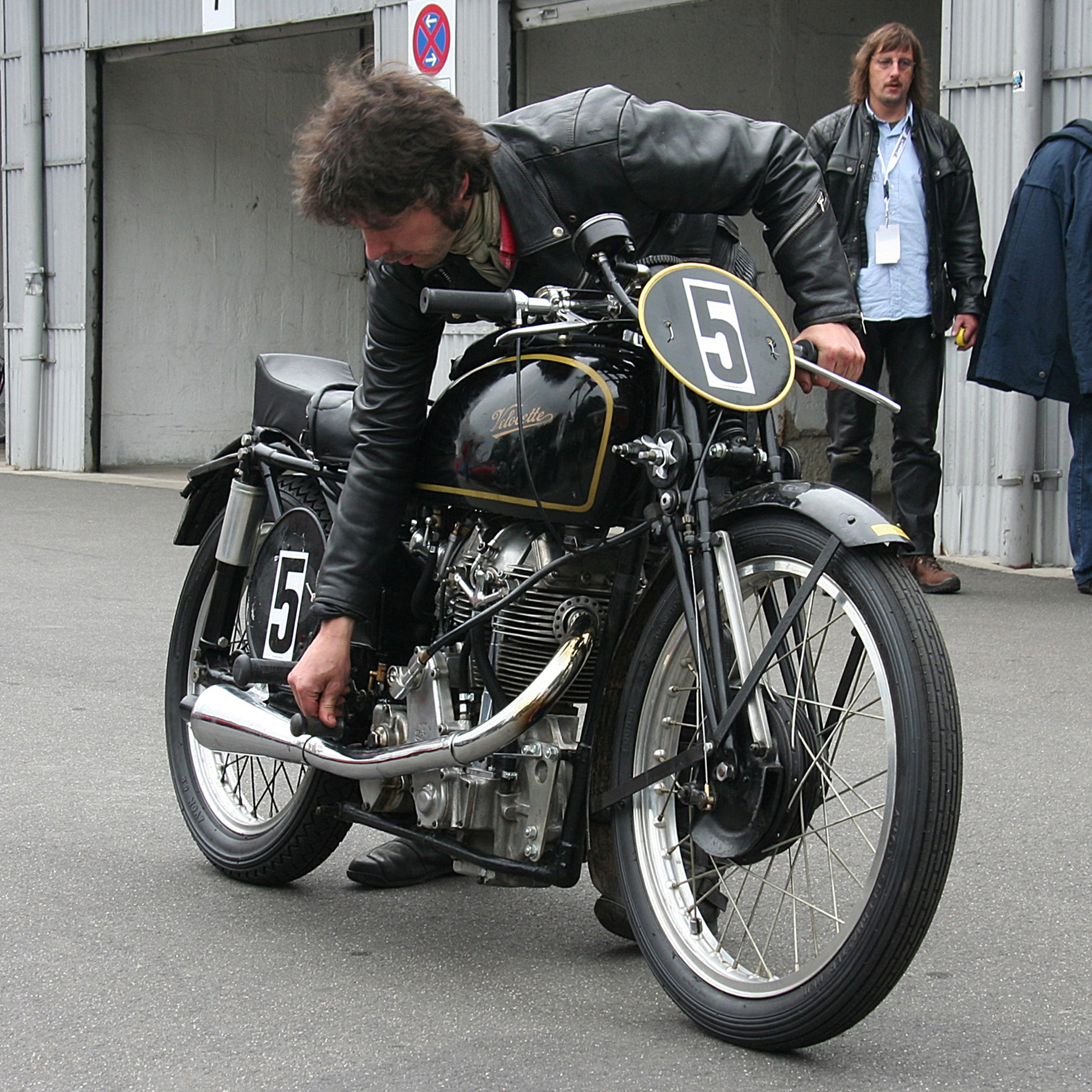 Velocette KTT Mk VIII, 350 cm³, Baujahr 1939